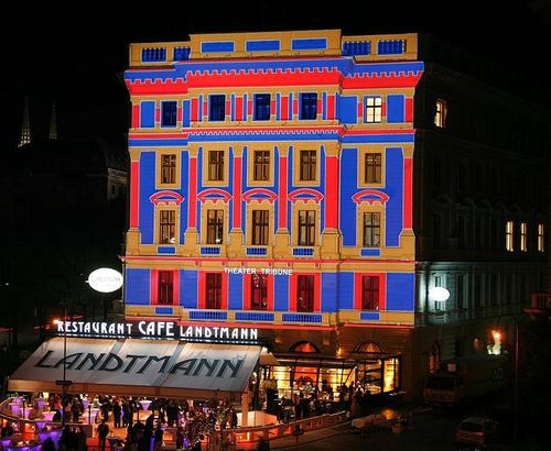 Projektion auf den Landtmannfassade bei Nacht